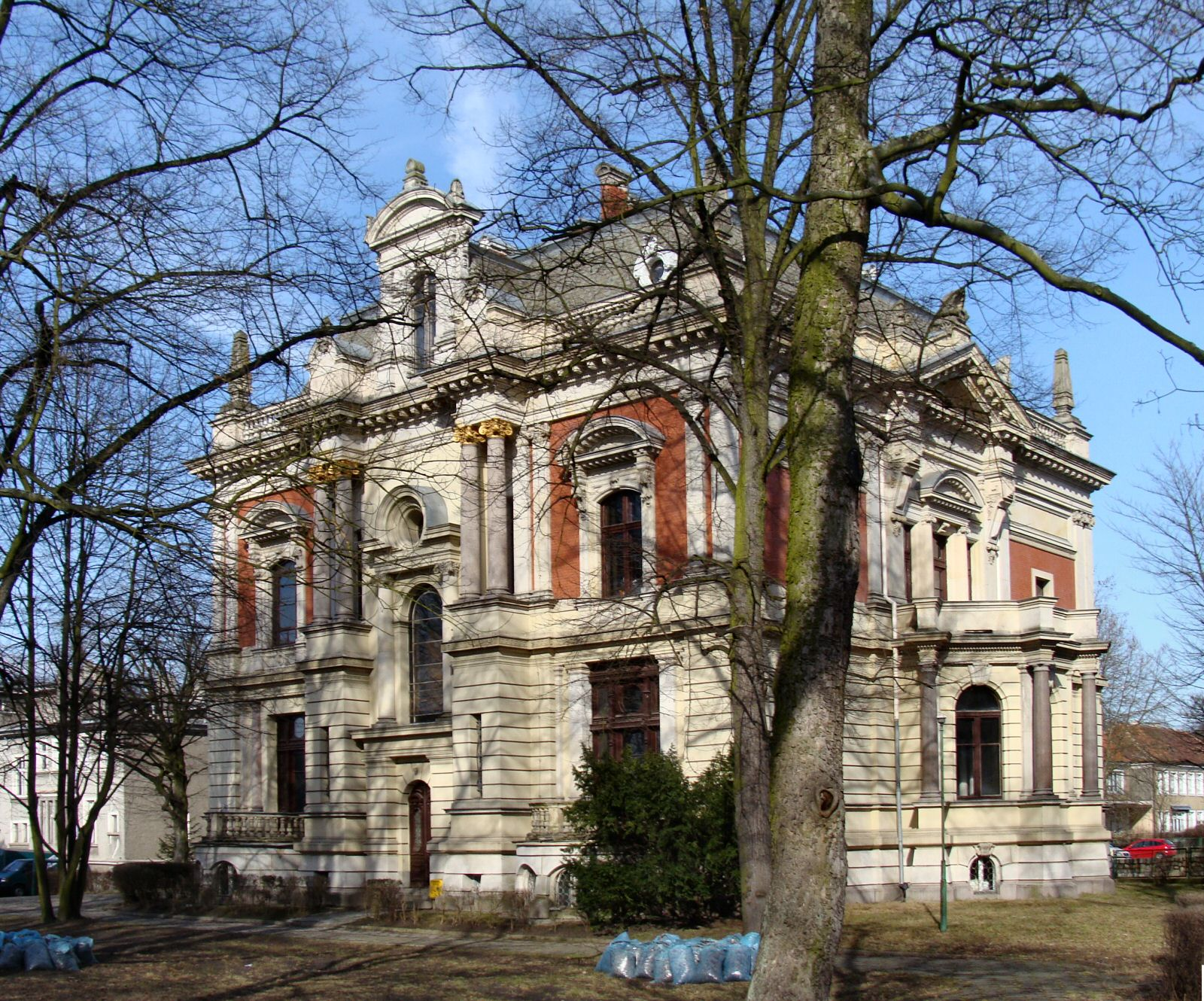 Szczecin, al. Wojska Polskiego 84 - dawna "Willa Lentza" (dec. pałacyk), XIX/XX